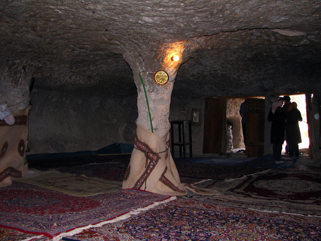 The mosque in Maymand - The Village in stones روستای میمند کرمان- خانه های دست کند در دل صخره های سنگی!؛